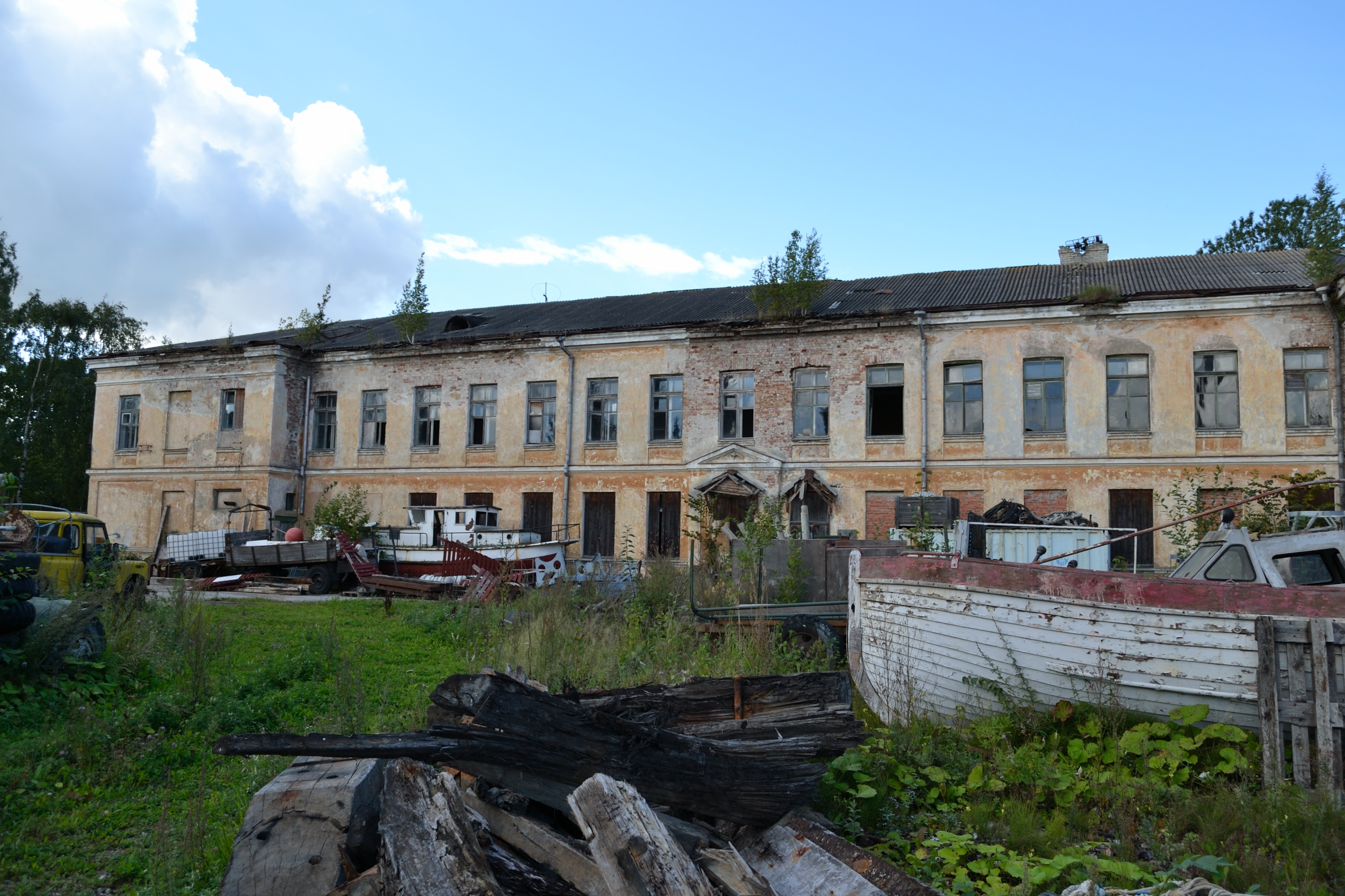 Tallinn, Lennusadama staabihoone ja kasarmuhoone Küti tn 15a